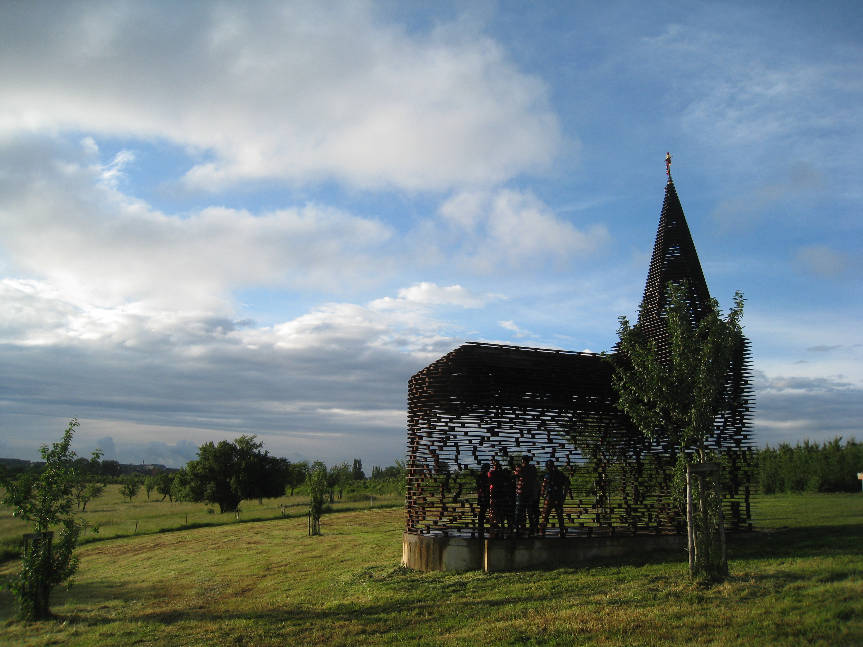 Doorkijkkerk te Borgloon (Belgisch-Limburg)